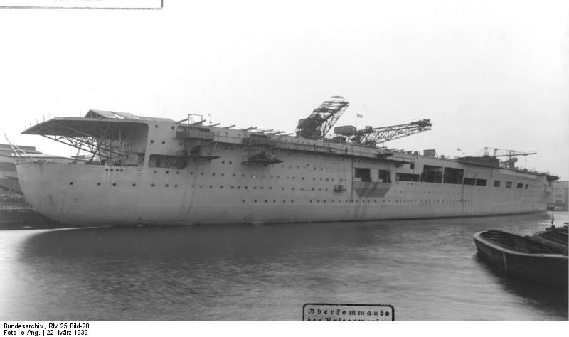 Flugzeugträger "A". Baustadium Aufgen. am 22.3.1939 Deutsche Werke Kiel